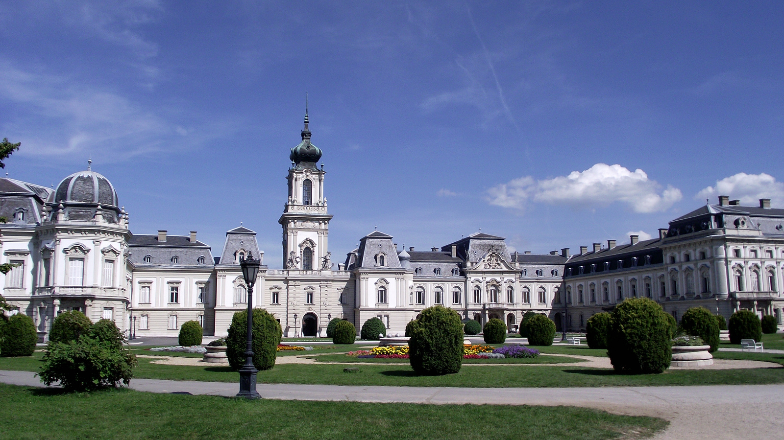 Festetics-kastély (Keszthely, Kastély u. 1 .) This is a photo of a monument in Hungary. Identifier: 10876